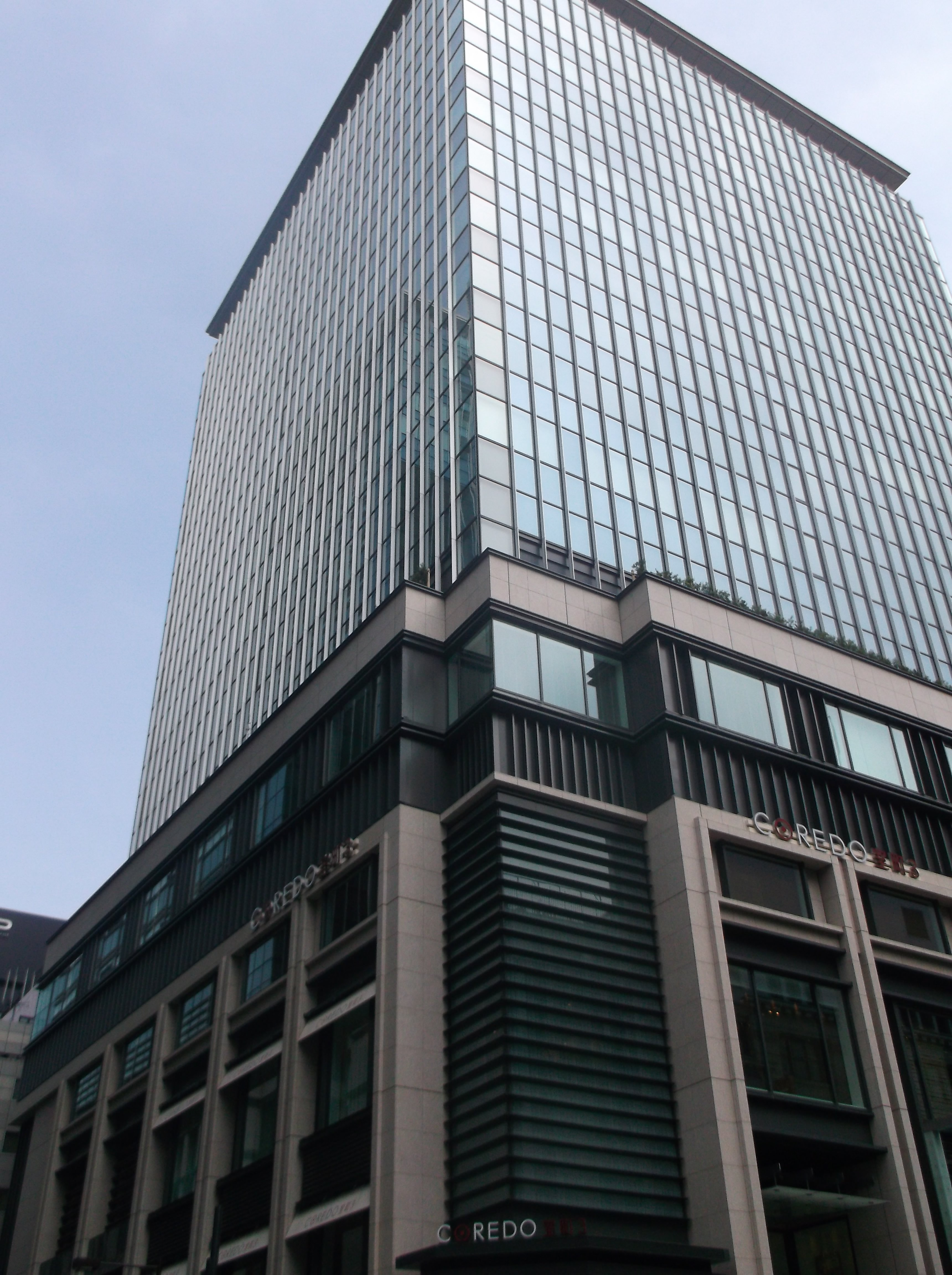 東京都中央区日本橋室町にある「室町ちばぎん三井ビルディング」(コレド室町3)の写真。